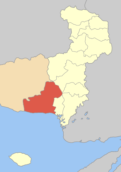 Дем Дедеагач на картата на Ном Еврос, Гърция. Locator map of Alexandroupoli municipality (Δήμος Αλεξανδρούπολης) in Evros prefecture (Νομός Έβρου) in Greece.